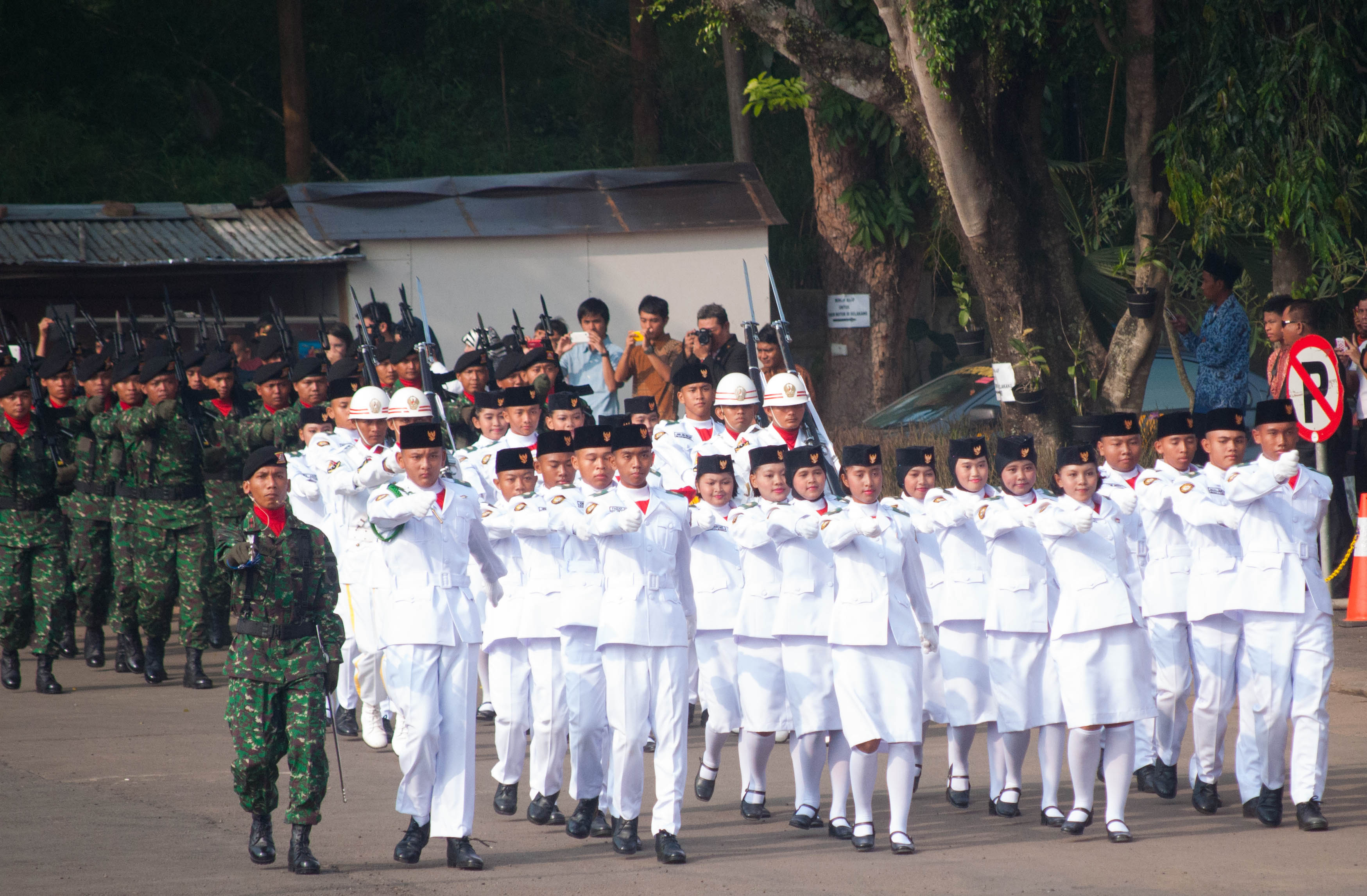 PASKIBRAKA berbaris pada saat HUT RI dengan pasukan TNI-AD sebagai pasukan 45 di belakang.